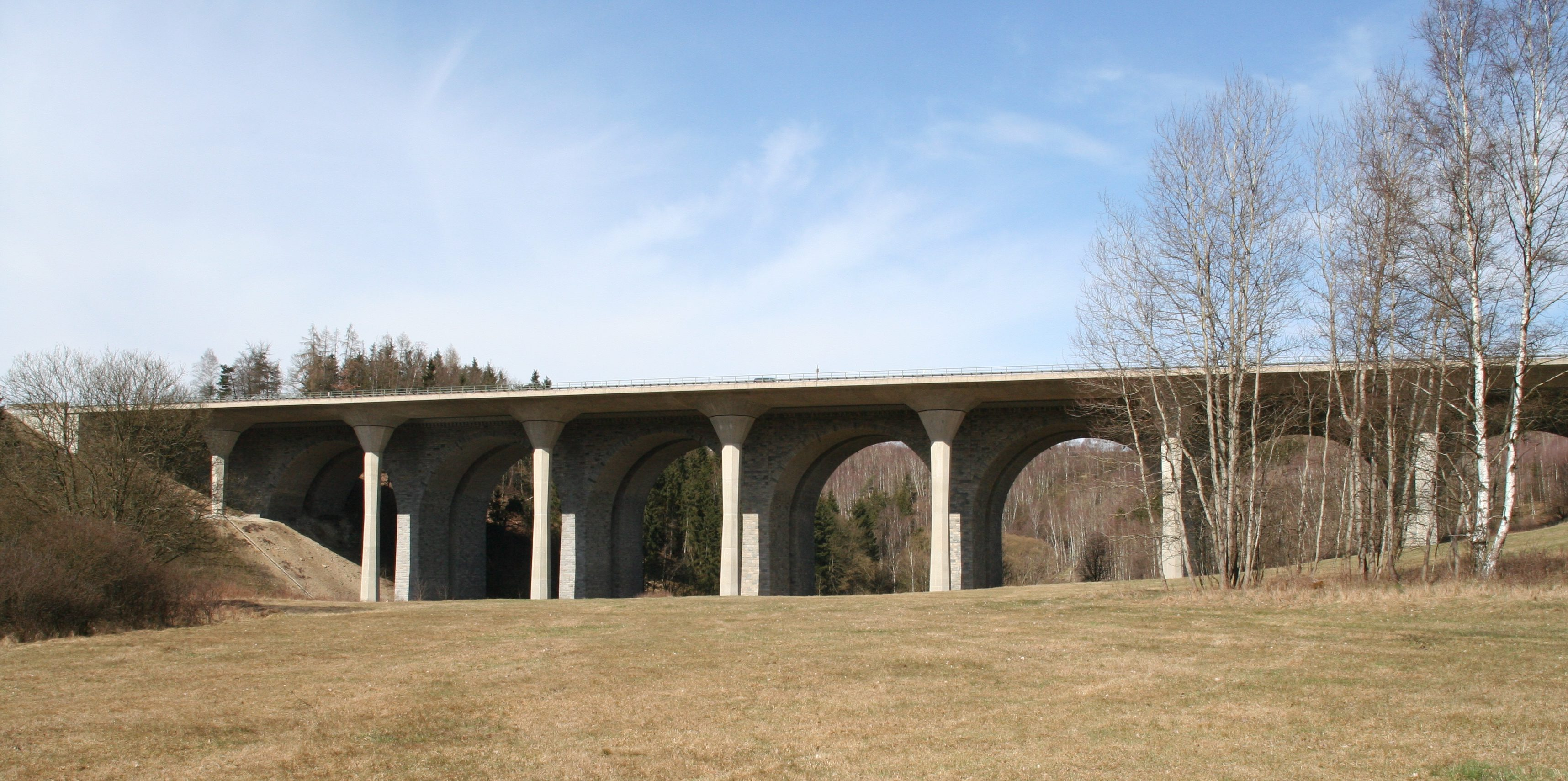 Saalebrücke Rudolphstein (Brücke der Deutschen Einheit) der A9, bei Lehesten Ortsteil von Hirschberg im Saale-Orla-Kreis; Blickrichtung auf Brücke Fahrtrichtung Berlin